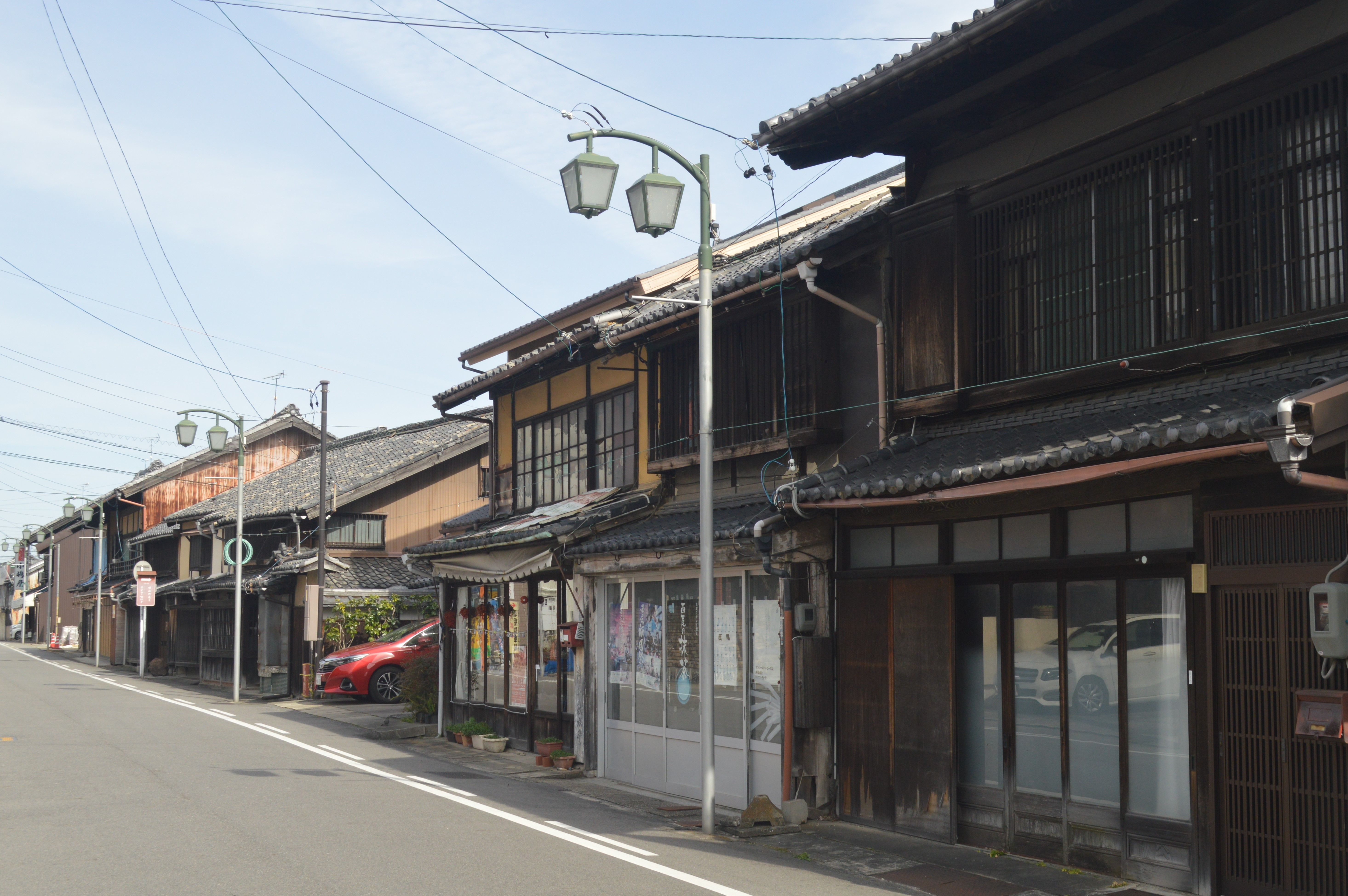 愛知県西尾市にある肴町通り。